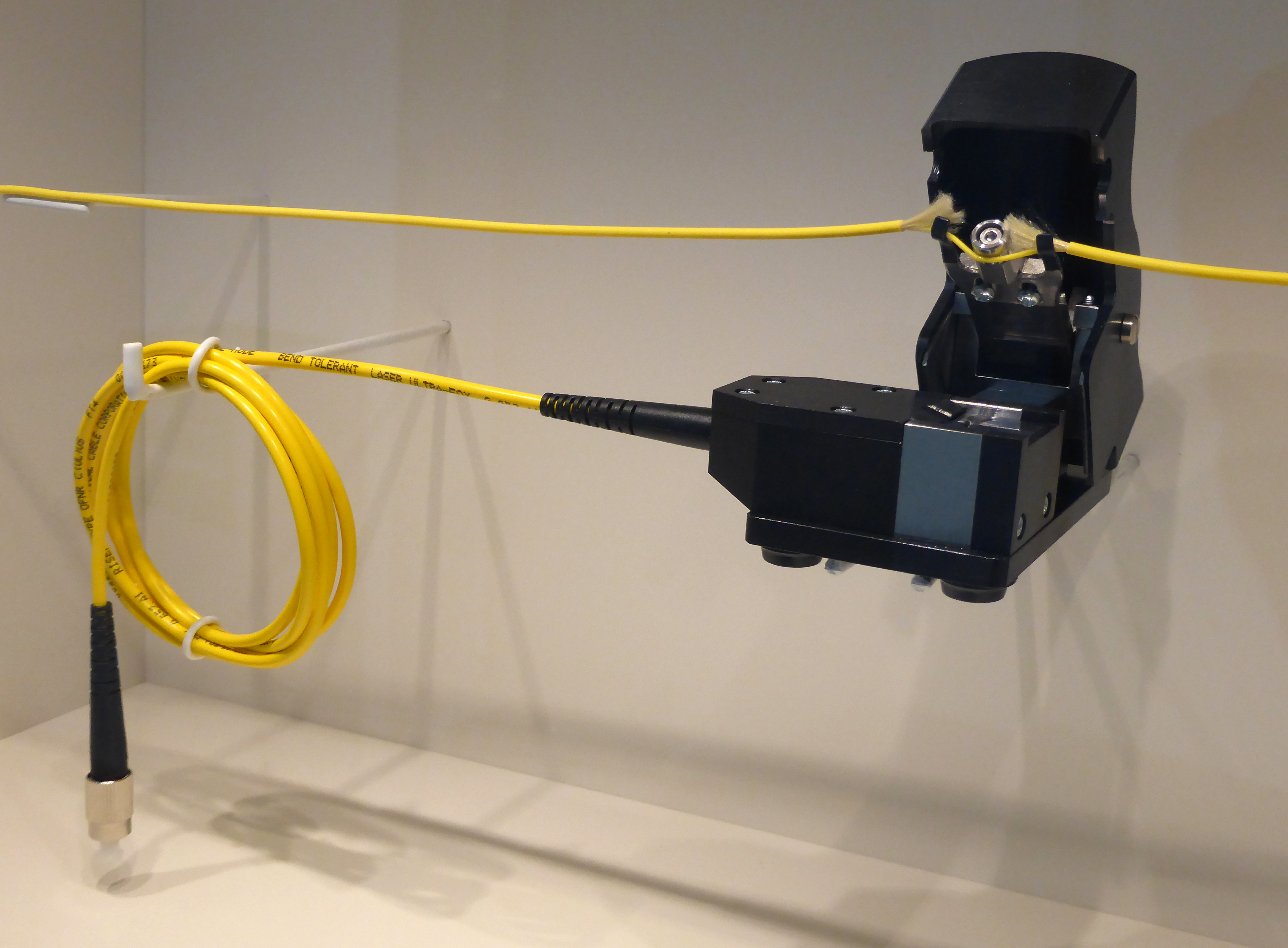 Abhörgerät Biegekoppler an einem Glasfaserkabel (Coupler-Methode) im Deutschen Technikmuseum in Berlin. Wikipedianische KulTour am 10. Oktober 2015 in der Ausstellung des Museums.